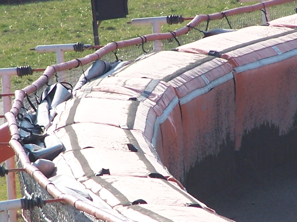 dmuchana banda